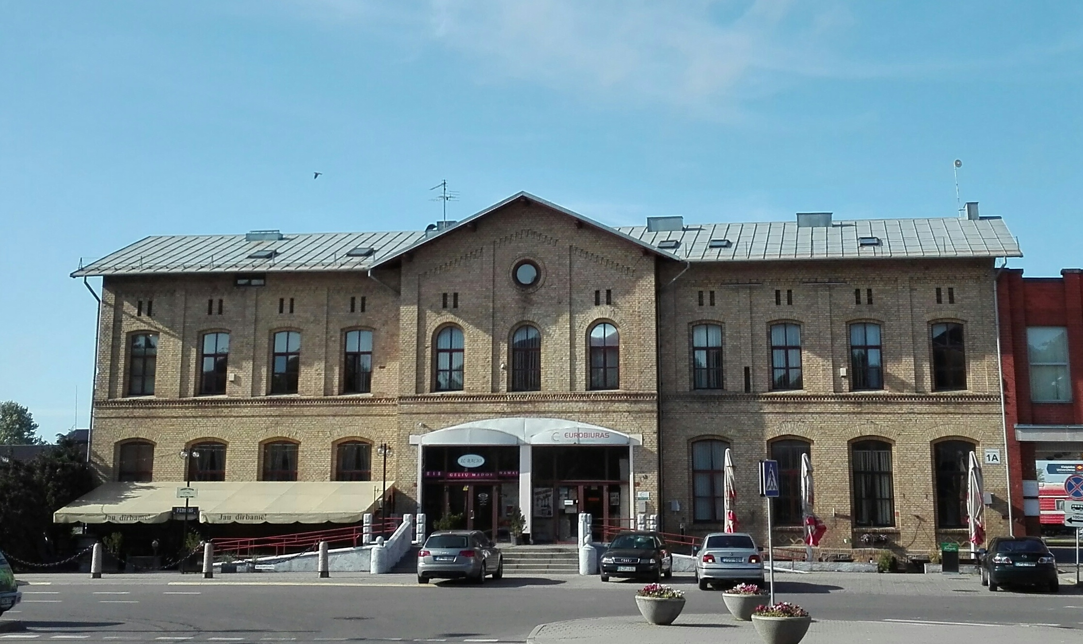 Senoji Klaipėdos geležinkelio stotis